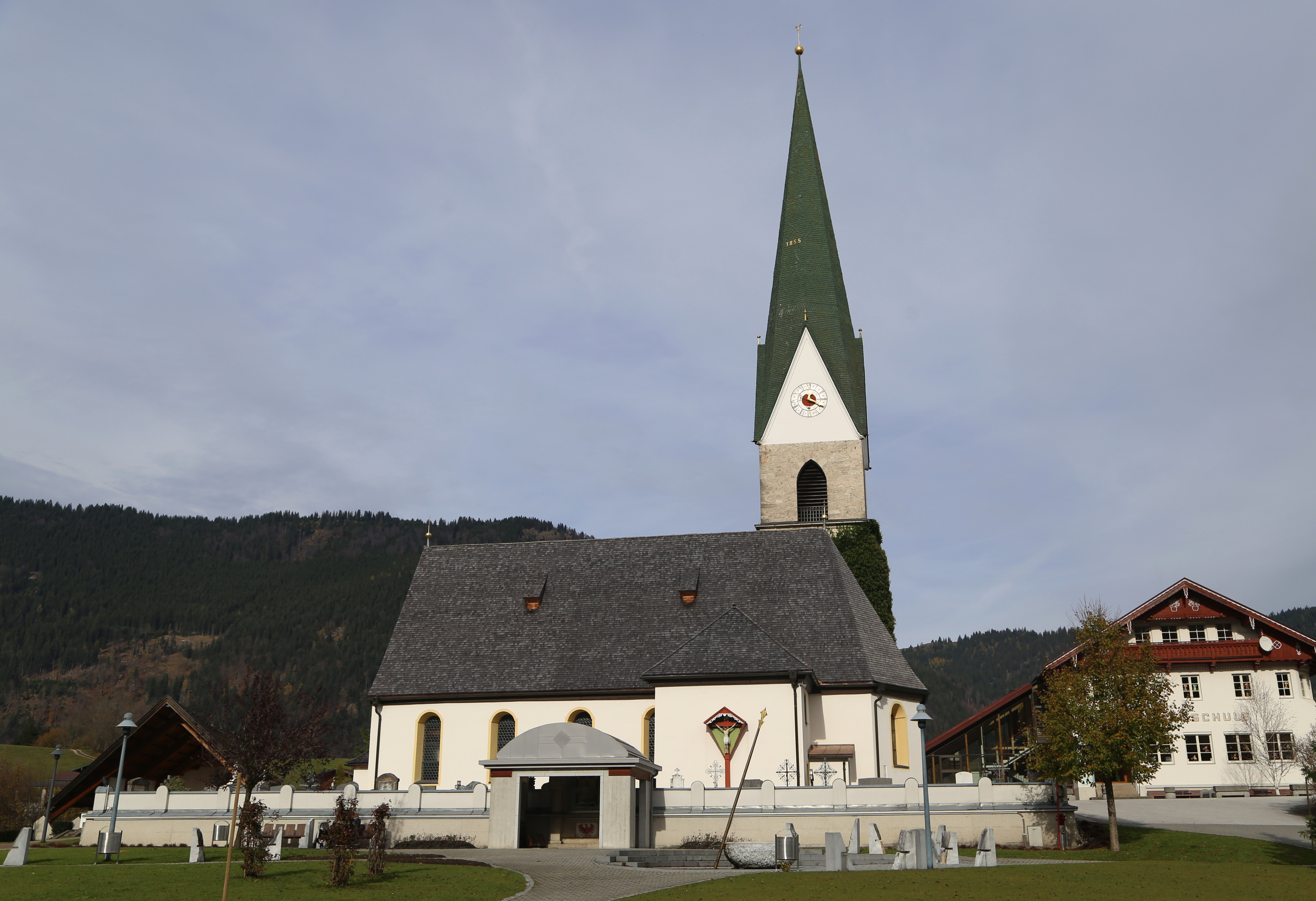 Sankt Nikolaus, Hinterthiersee, Thiersee, Tirol